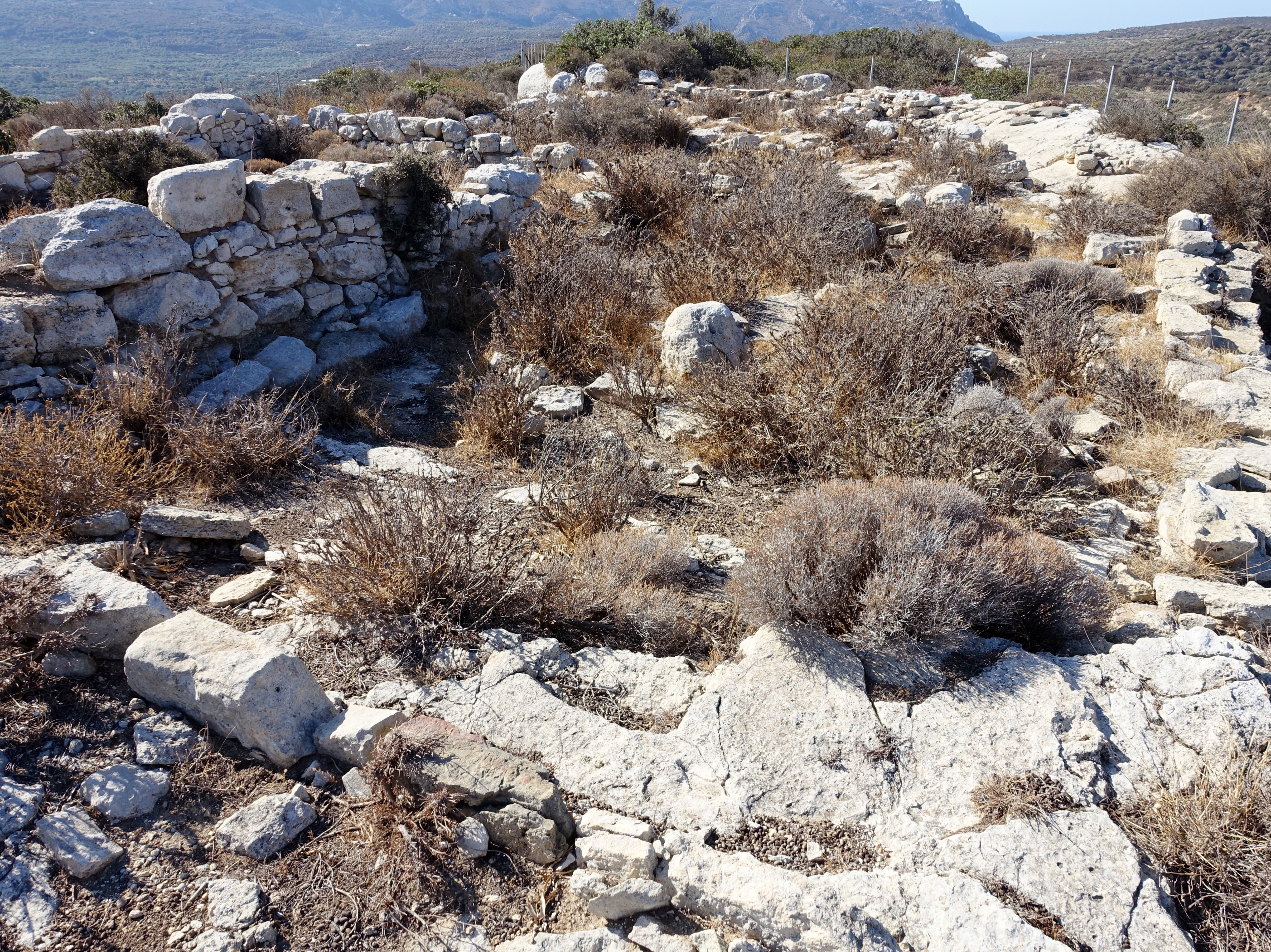 Ausgrabungsstätte von Vassiliki Kephala (Βασιλική Κεφάλα) bei Vasiliki, Gemeinde Ierapetra, Kreta, Griechenland